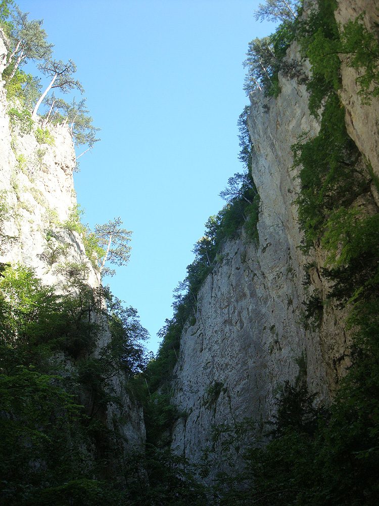 Ущелье/Склоны Большого каньона Крыма